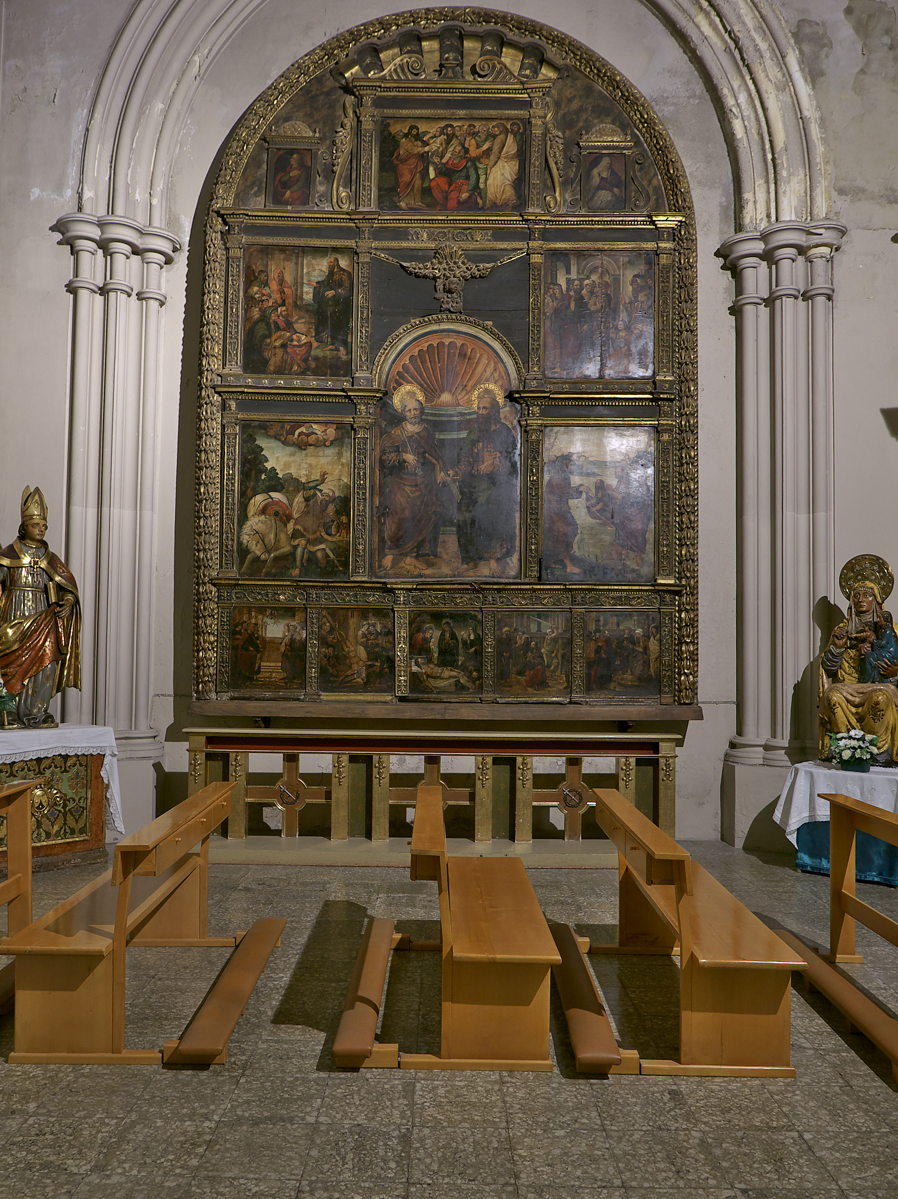 Capilla de san Pedro y san Pablo, Iglesia de San Pablo, Zaragoza. Retablo manierista atribuido a Jerónimo Cósida.